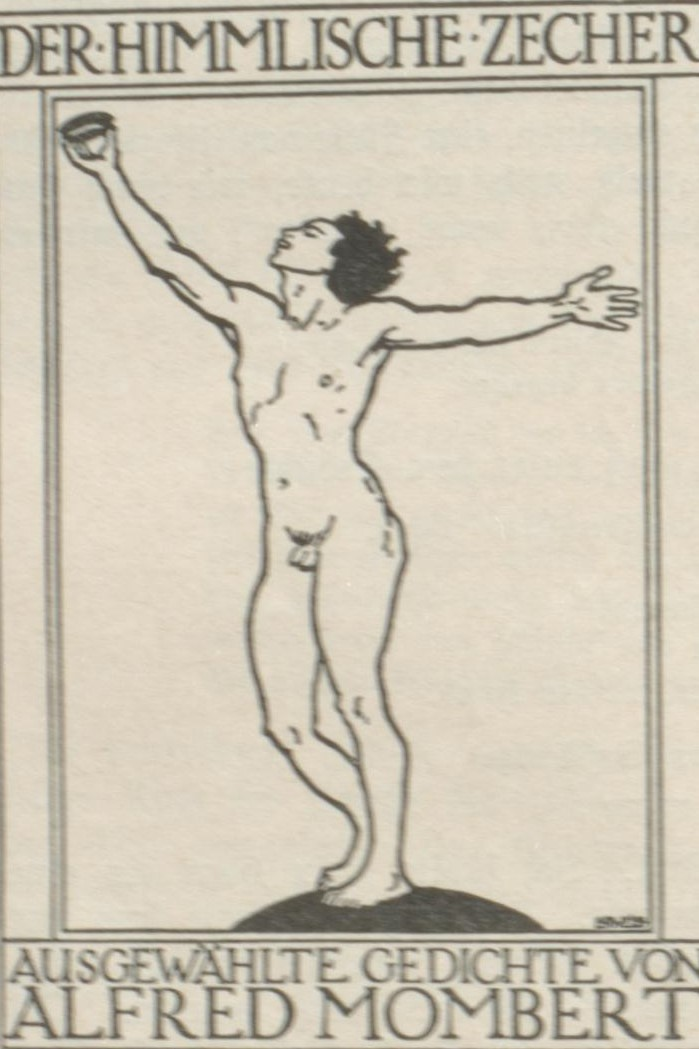 Emil Rudolf Weiß Titel zu Alfred Mombert Der himmlische Zecher Gedichte 1909